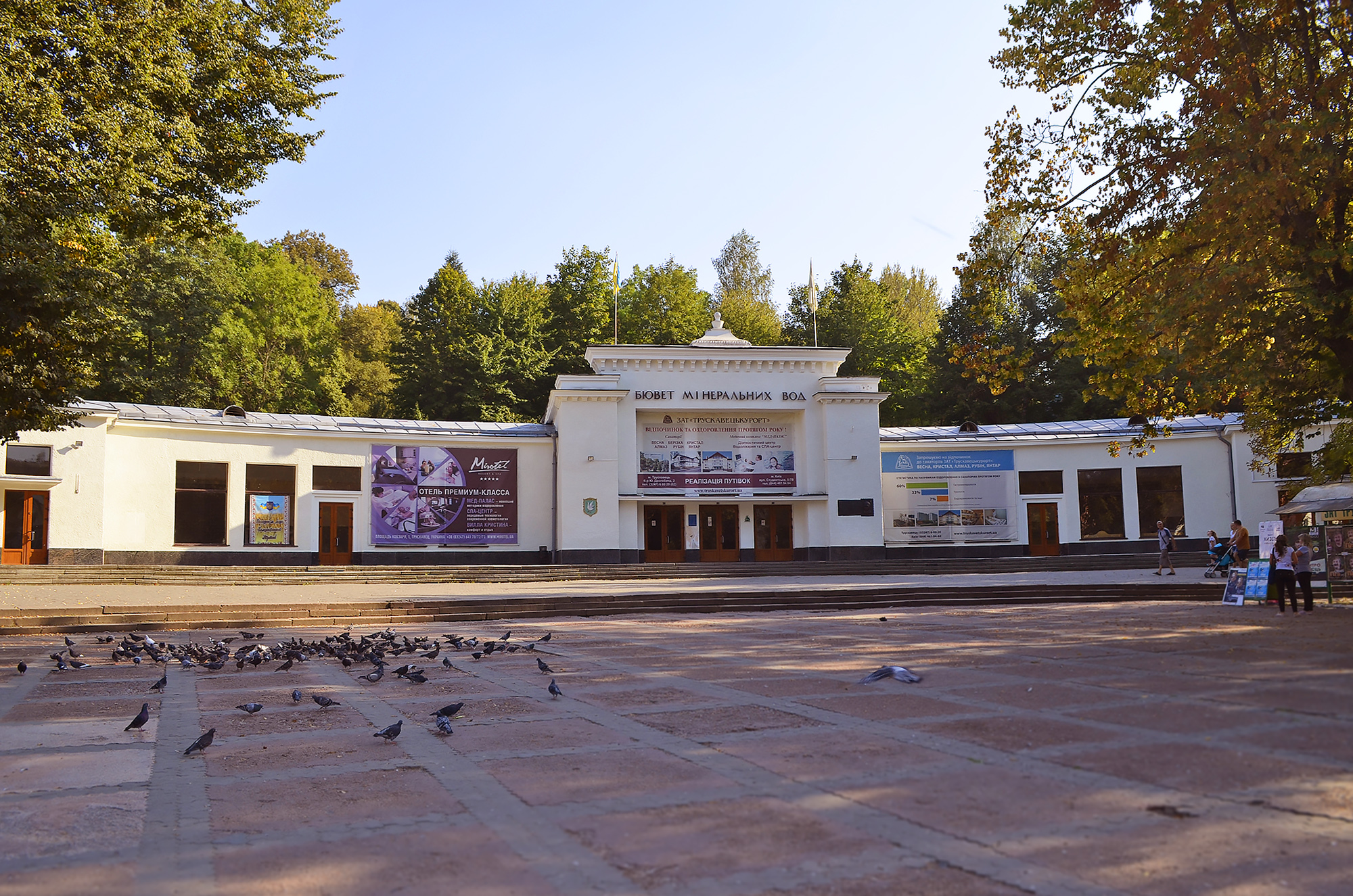 Центральный Бювет №1 (лечебные воды: "Нафтуся", Мария, София). Расположен в курортном парке курорта "Адамивка"